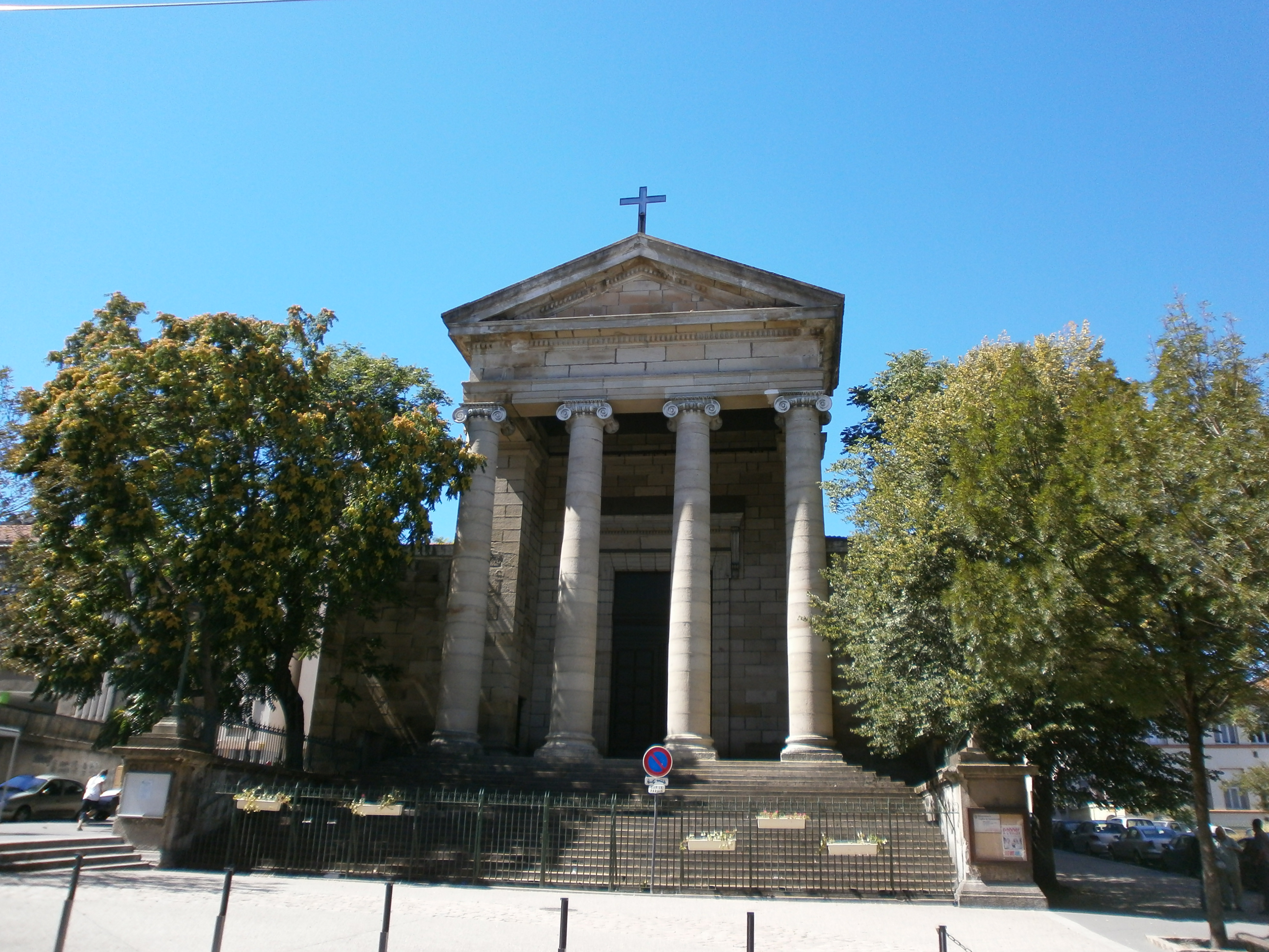 Façade de l'église Saint-Ennemond